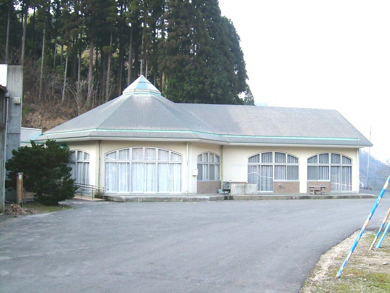 若桜町立若桜小学校吉川分校